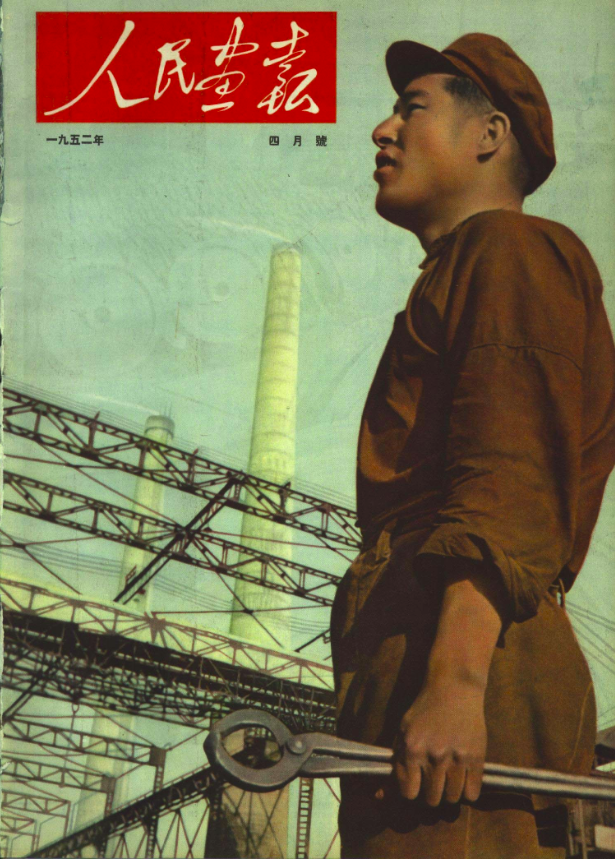 1952年天津 刘长福